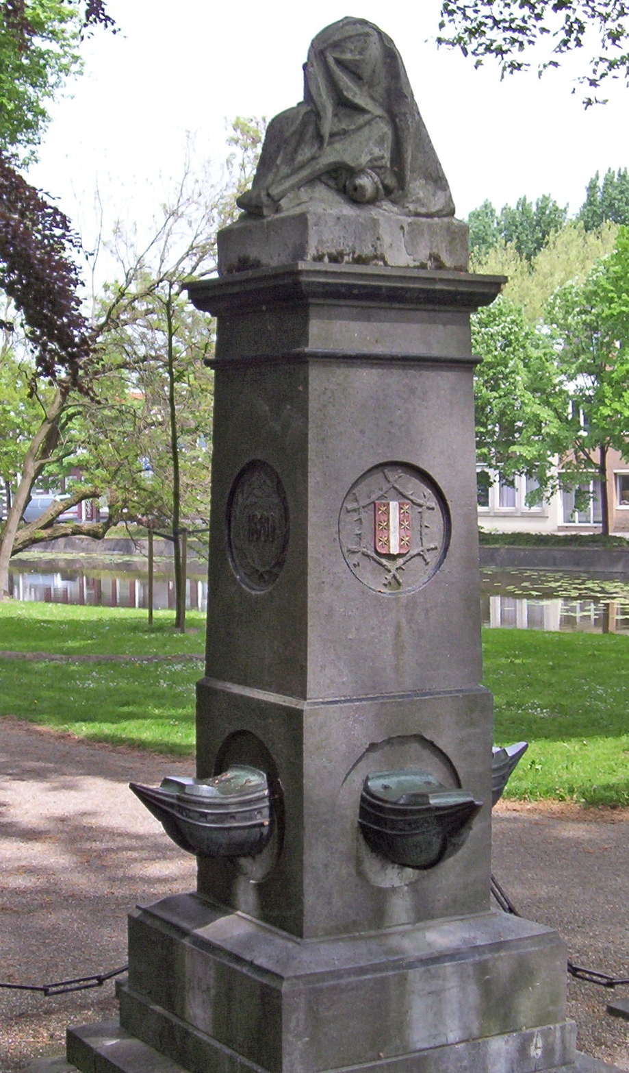 Monument ter herinnering aan de gebroeders Cornelis en Frederik De Houtman